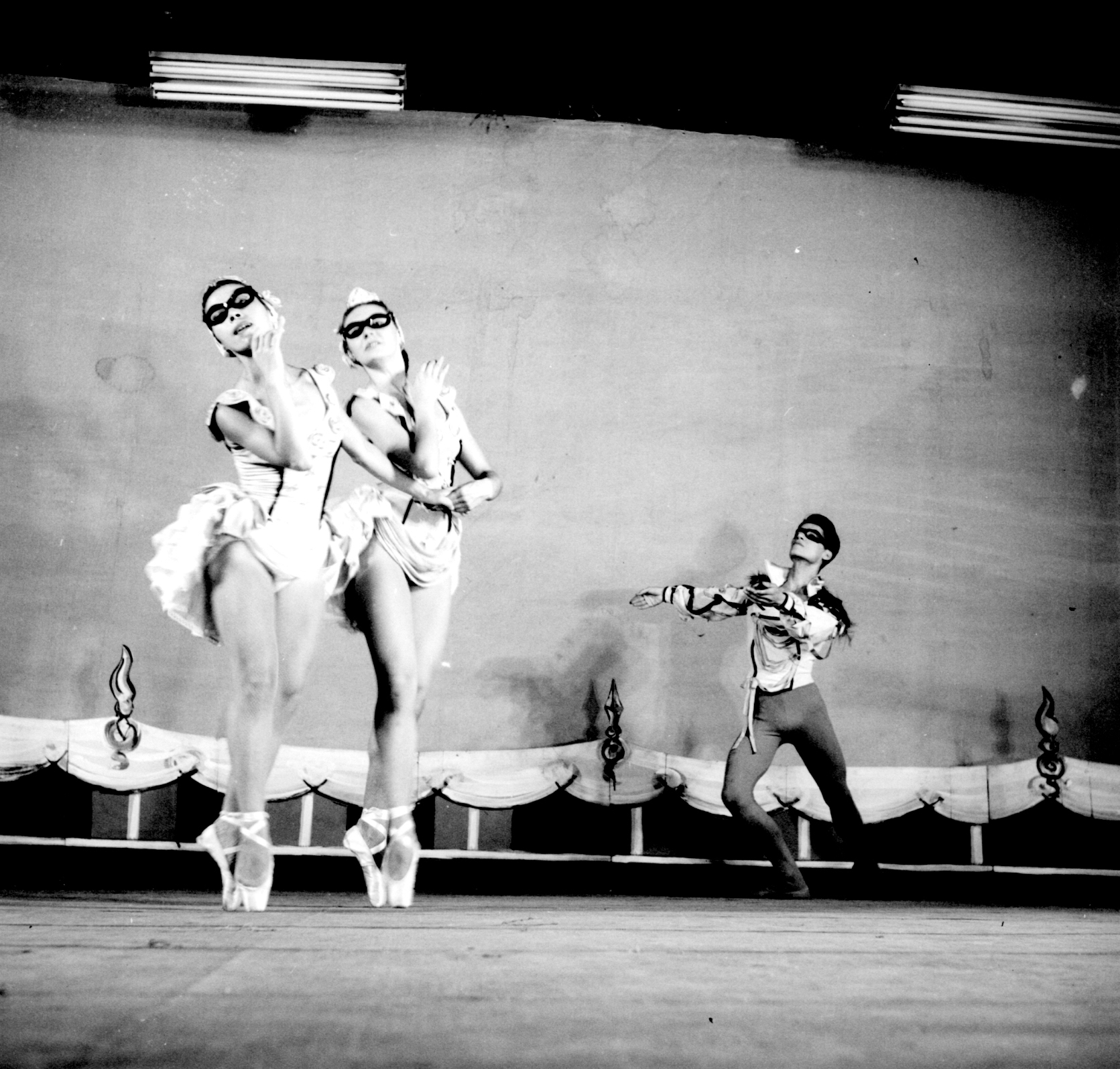 El BANCH en la presentación de la obra Alotria, 1954.